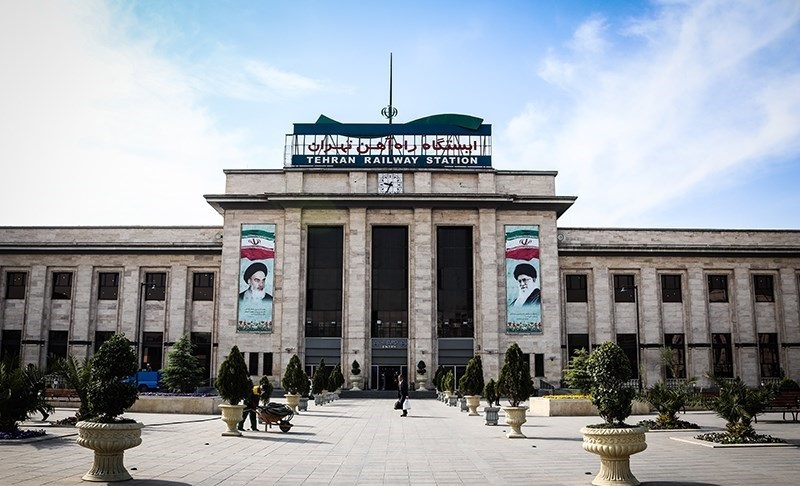 روزهای خلوت تهران